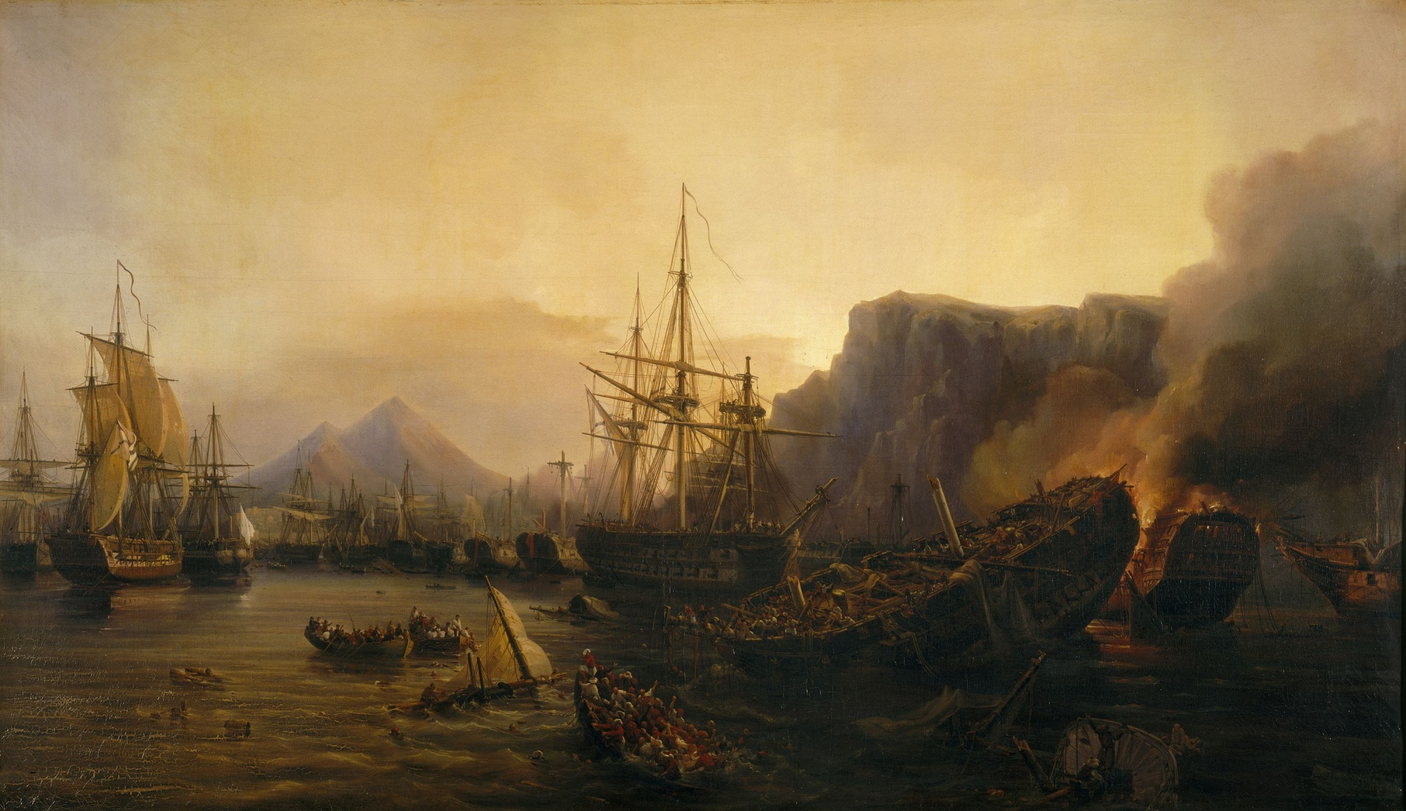 La scène se situe après le combat. Au premier plan, un vaisseau démâté est en train de couler, tandis qu'un autre est incendié. Les membres d'équipage tentent d'échapper à la noyade en s'échappant sur des embarcations.